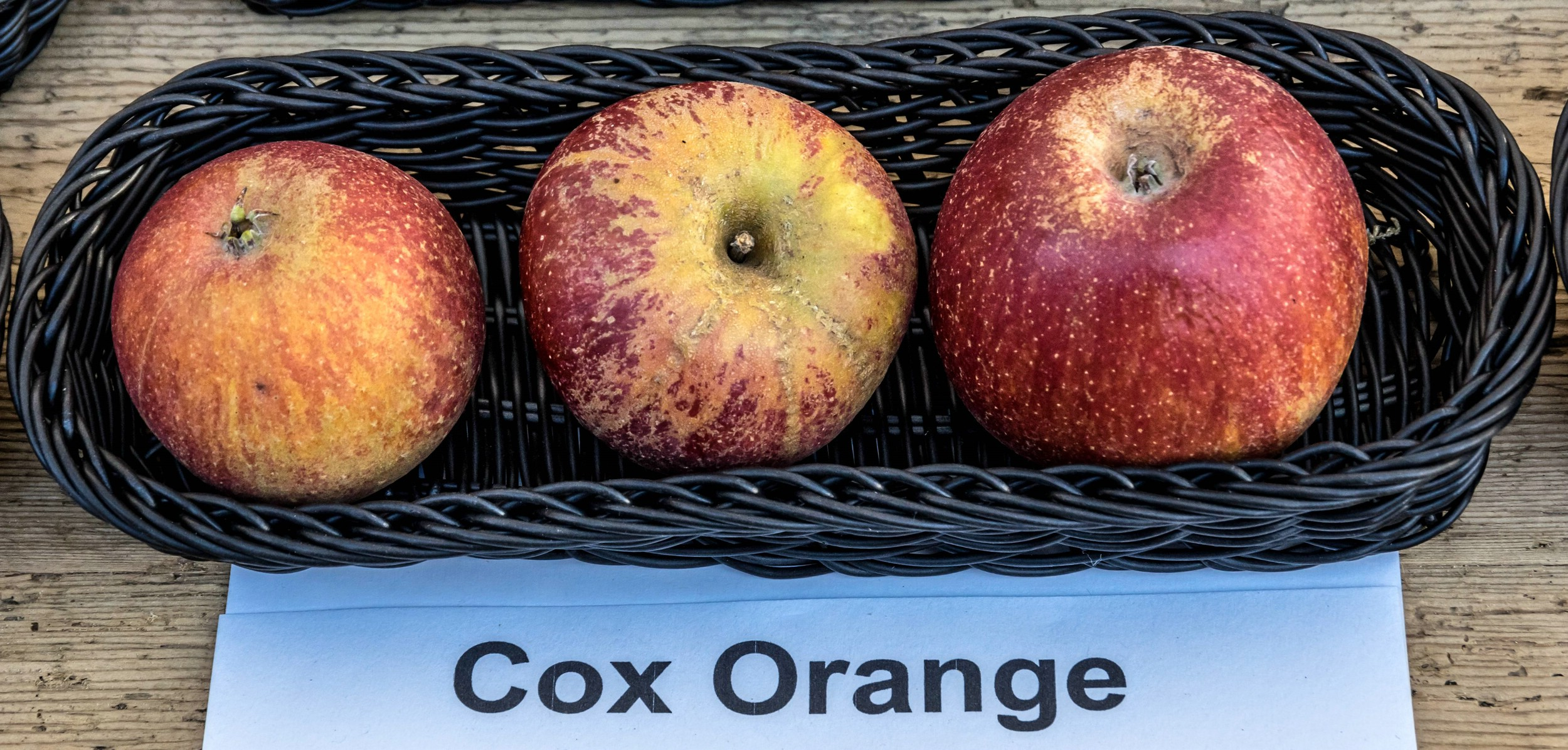 Alte Apfelsorten, von denen es im Badischen noch tragende Bäume gibt. Alle Aufnahmen au dem Oktober 2015